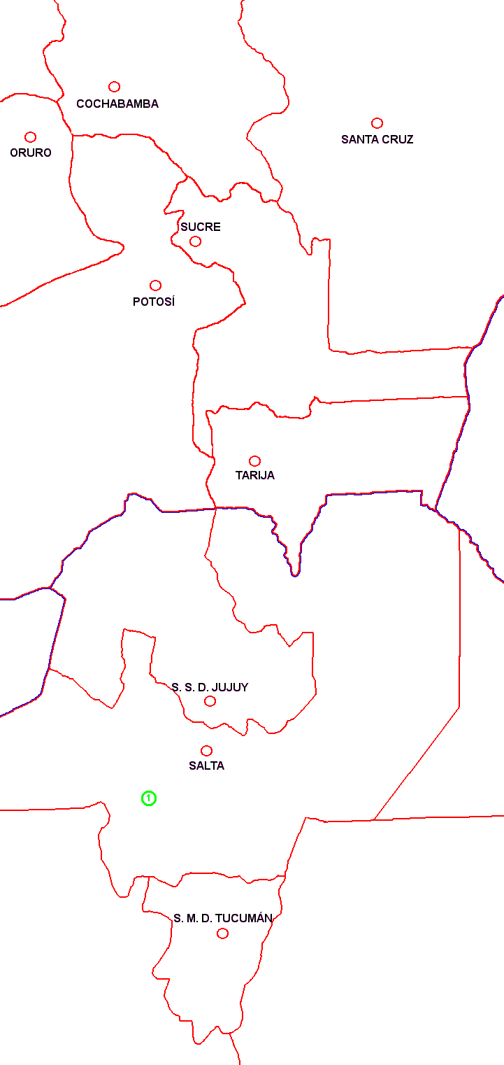 Rebutia violaciflora - range map